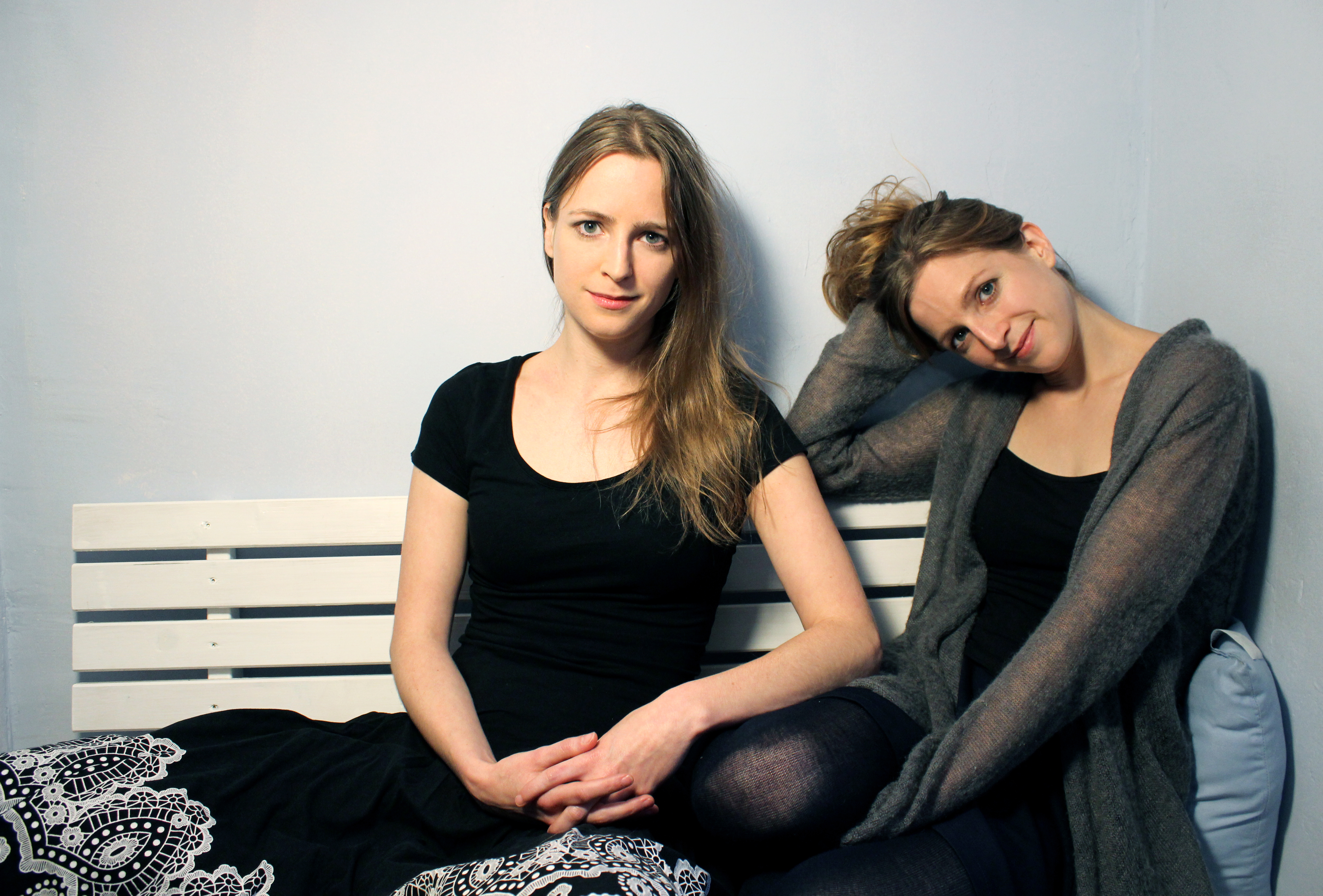 Die RaDeschnig Zwillinge